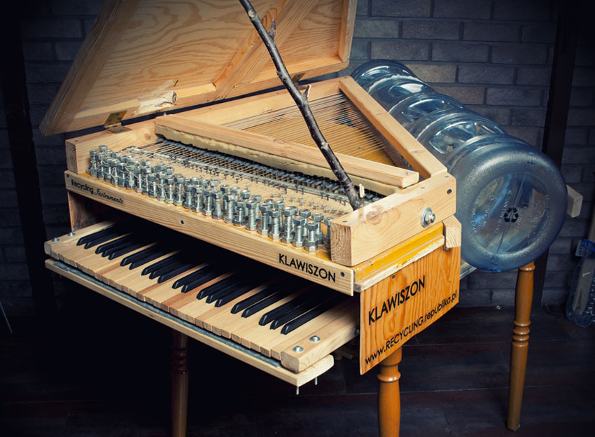 Klawiszon - self-made piano made of recycled materials by "Recycling Band"